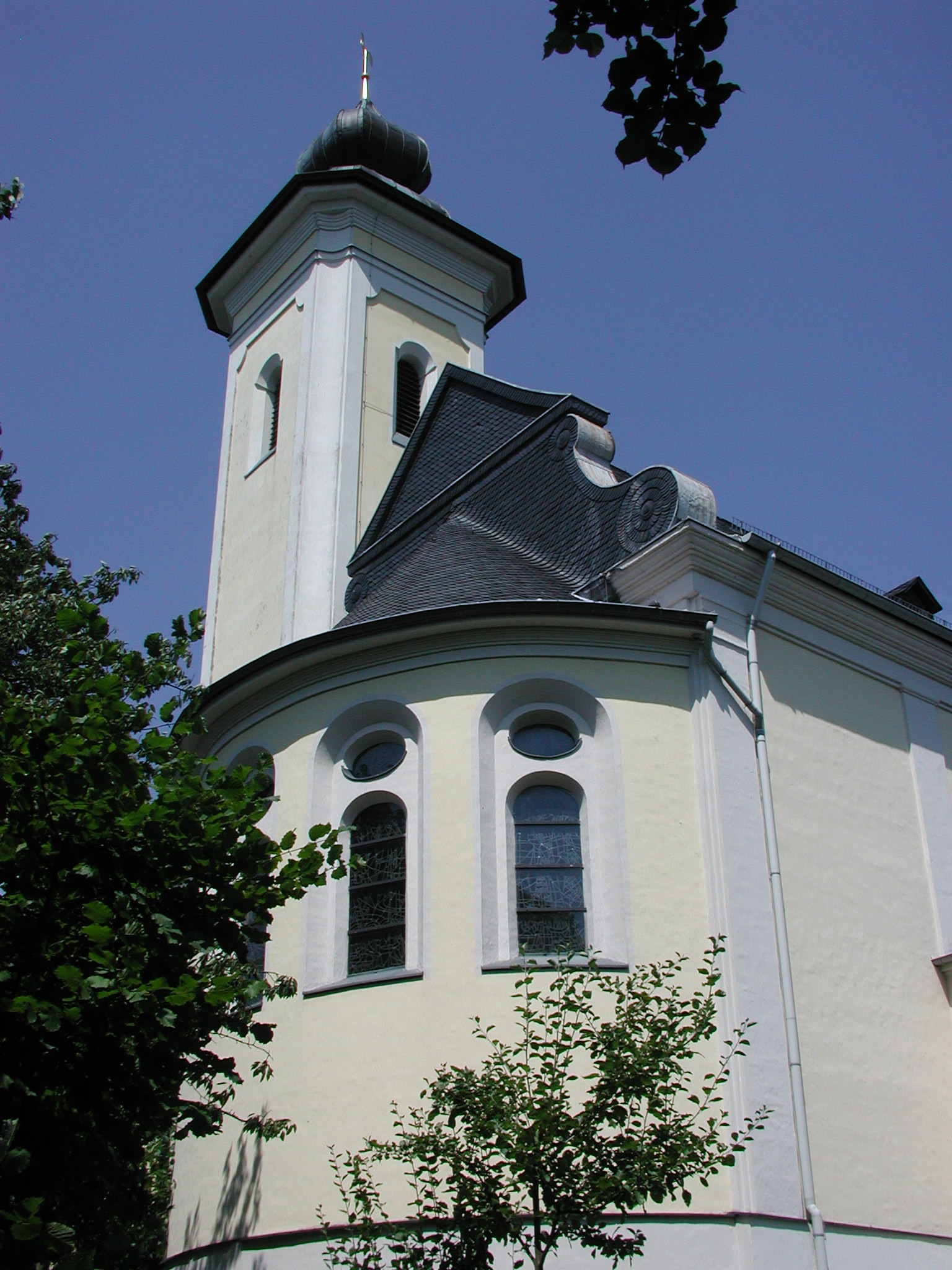 Heilig-Kreuz-Kirche, Remscheid